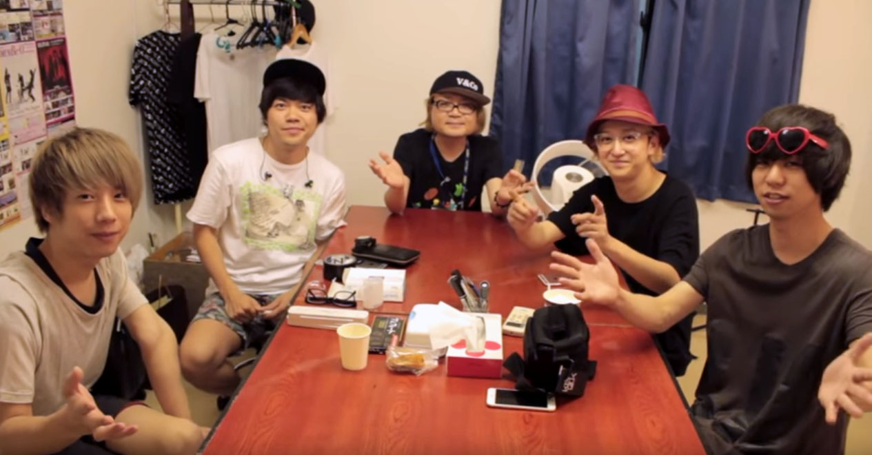 KEYTALK のメンバー。左から、 八木優樹（ドラムス・コーラス） 寺中友将（ボーカル・ギター） （KOGA RECORDS 代表の古閑裕） 小野武正（ギター・コーラス） 首藤義勝（ボーカル・ベース）